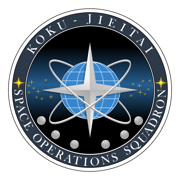 宇宙作戦隊 シンボル・マーク